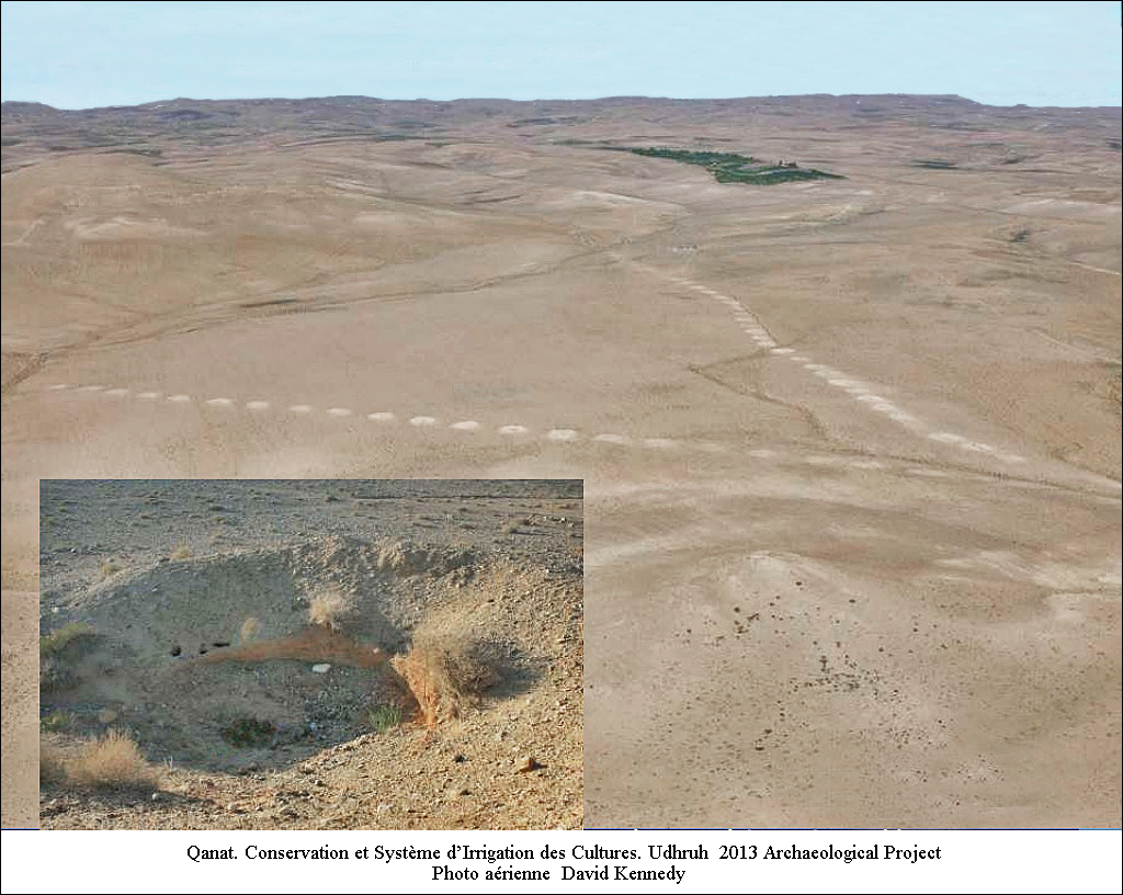 Alimentation d'une ferme à Udhruh, près de Pétra, par un qanat. Détail du puits.